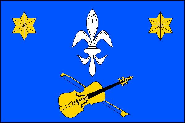 Vlajka obce Býchory